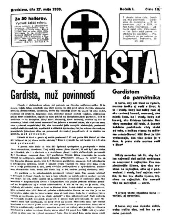 Titulný list časopisu Gardista.